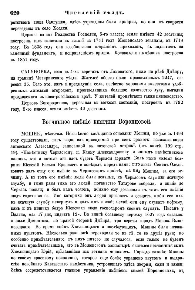 Страница 620